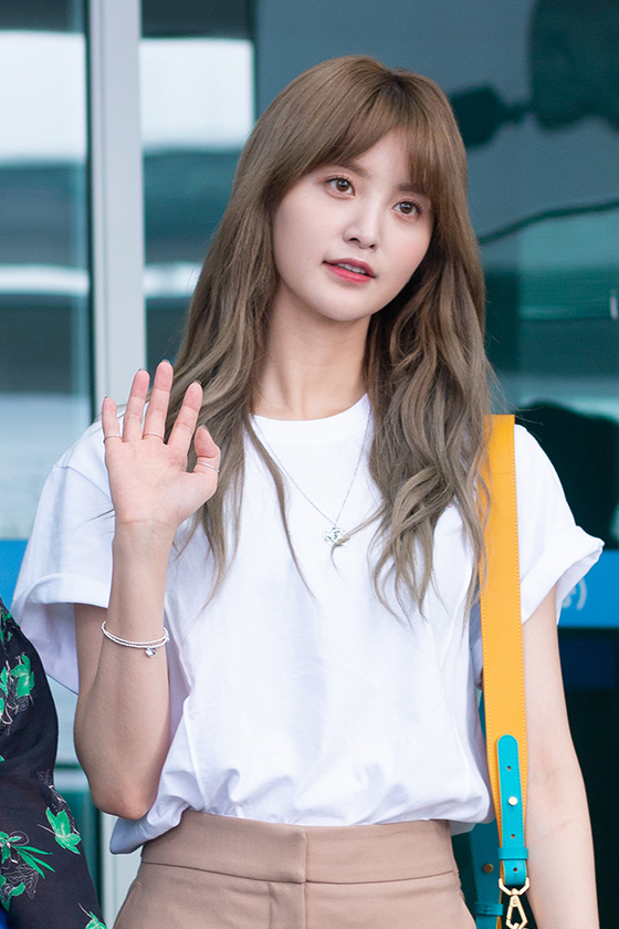 20180623 EXID 뉴욕 케이콘 출국.